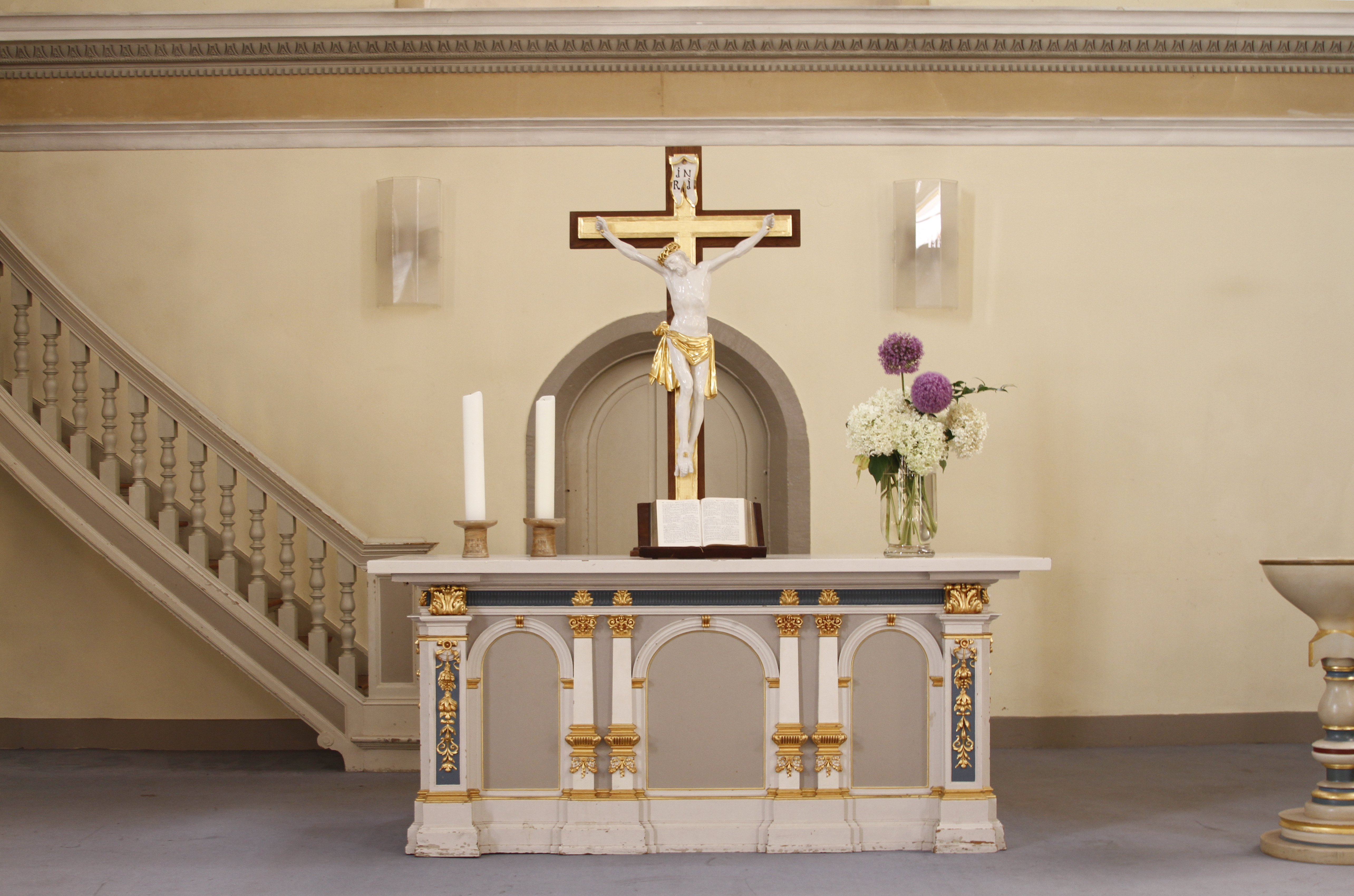 Providenzkirche - Heidelberg - Germany